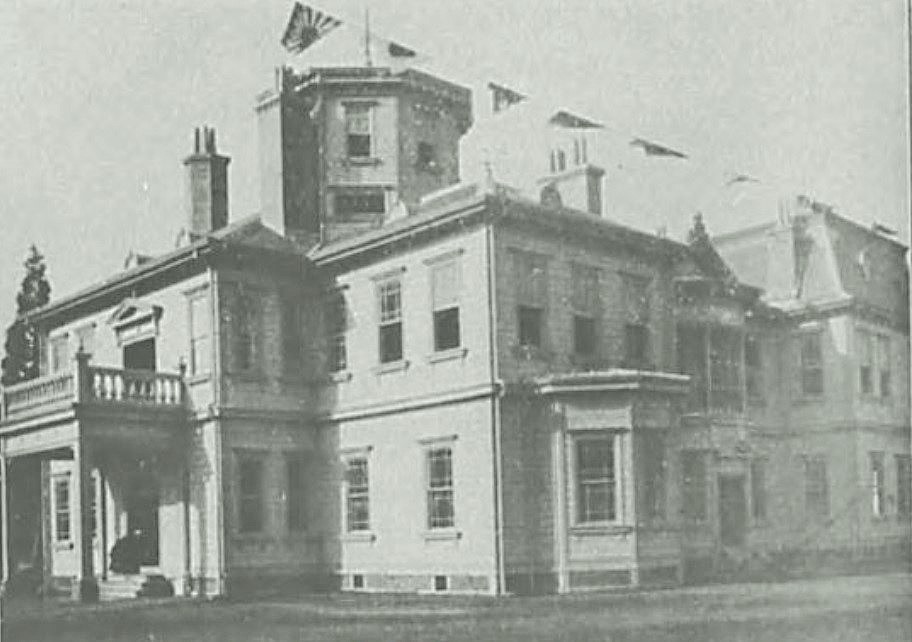 有栖川別邸 福島県